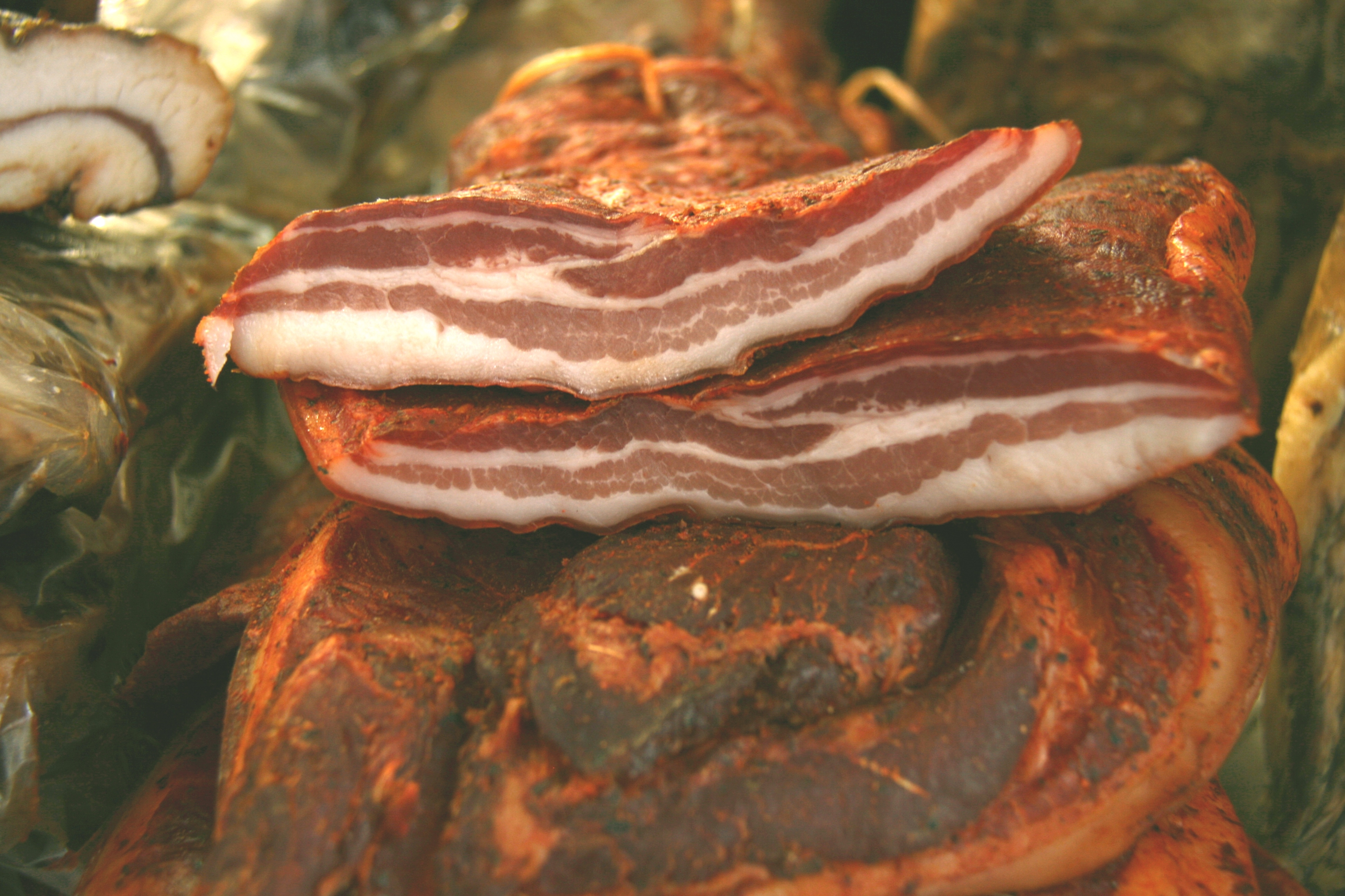 Panceta de cerdo iberico